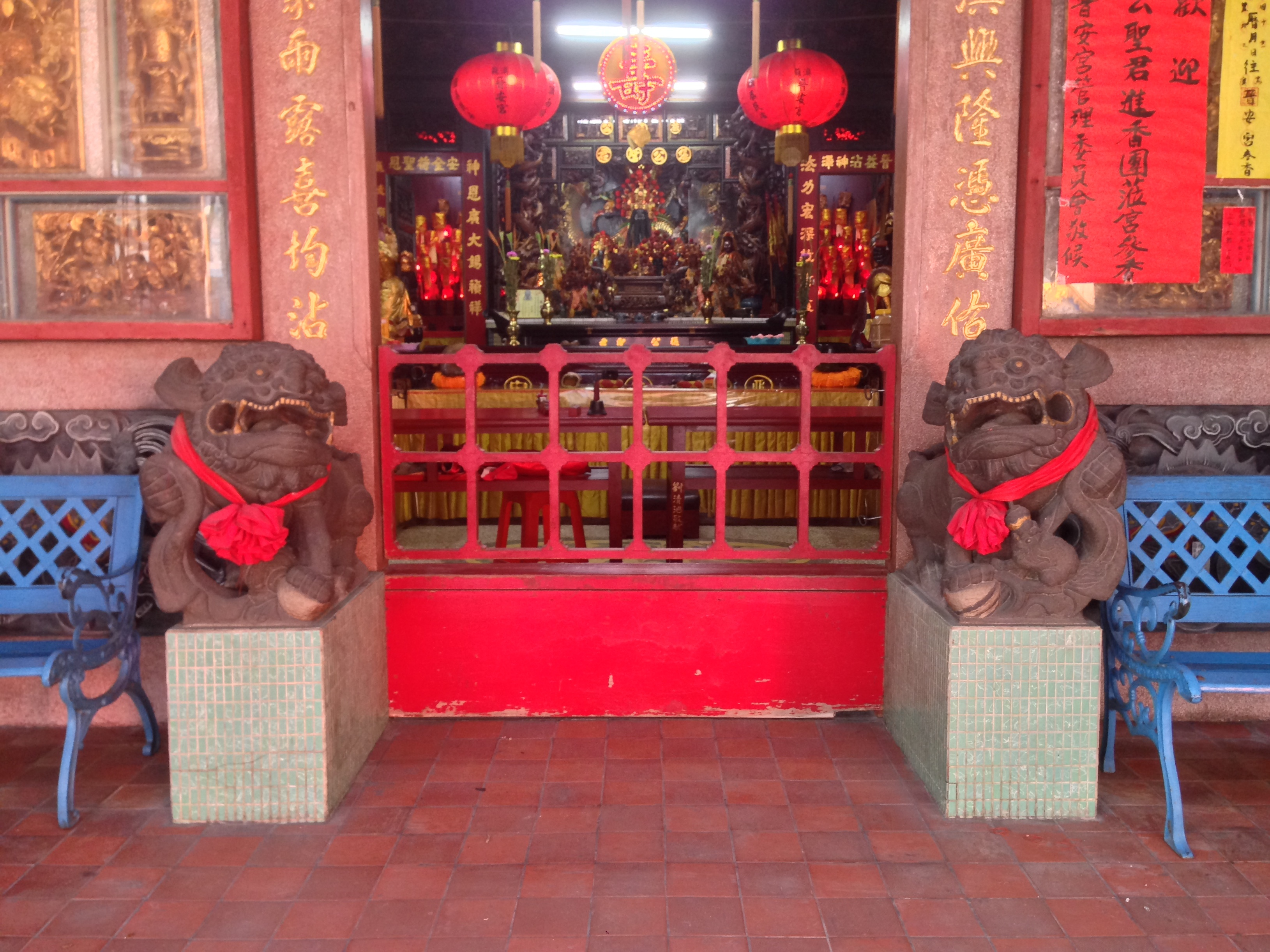 蘇澳晉安宮石獅